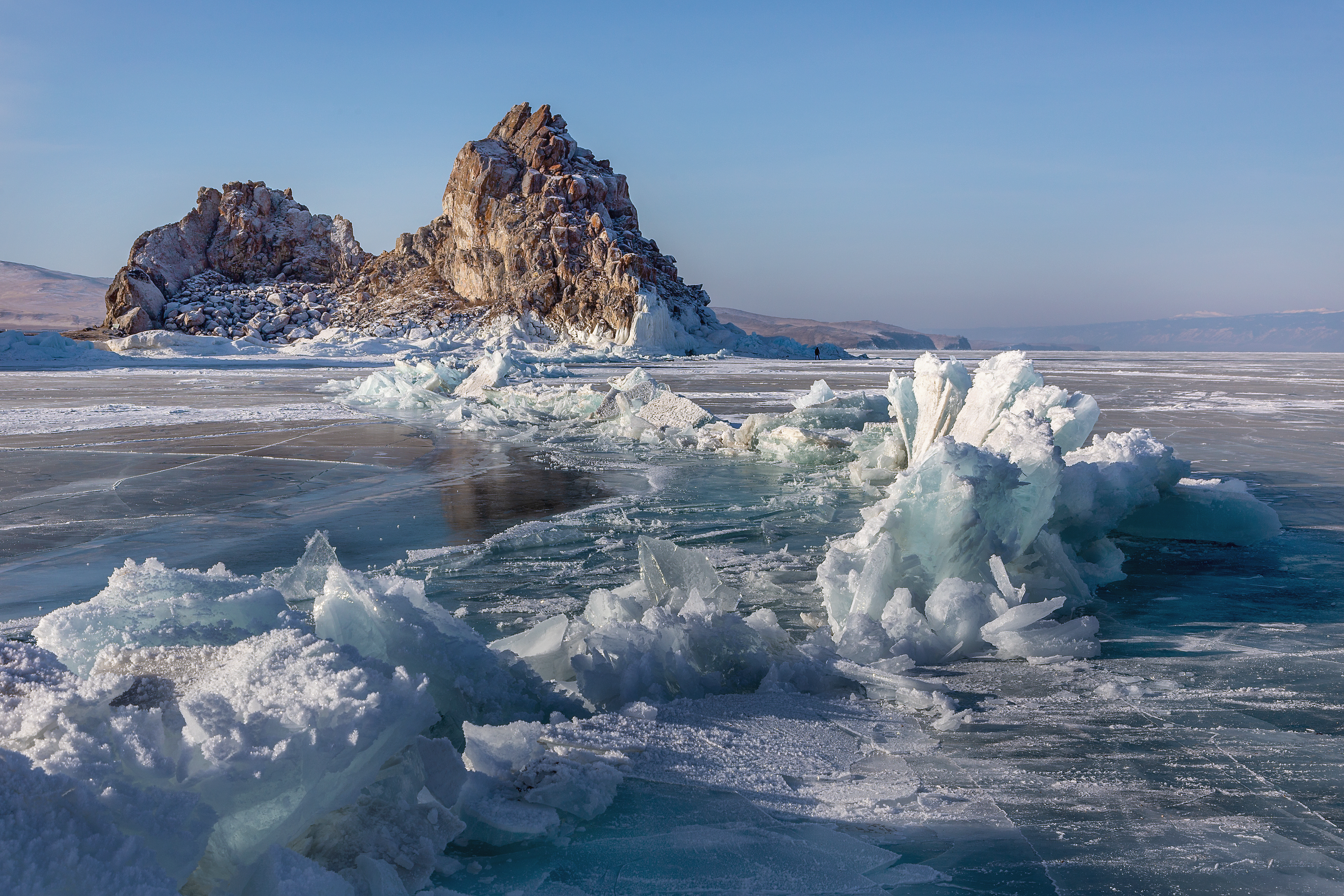 Мыс Бурхан (Скала Шаманка): о. Ольхон, Прибайкальский национальный парк, поселок Хужир, Ольхонский район, Иркутская область This image is related to the protected area of Russia number 3810274